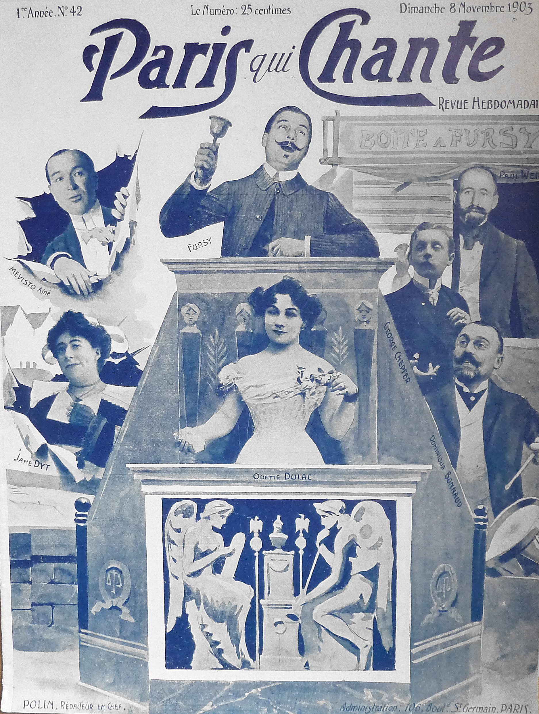 Description